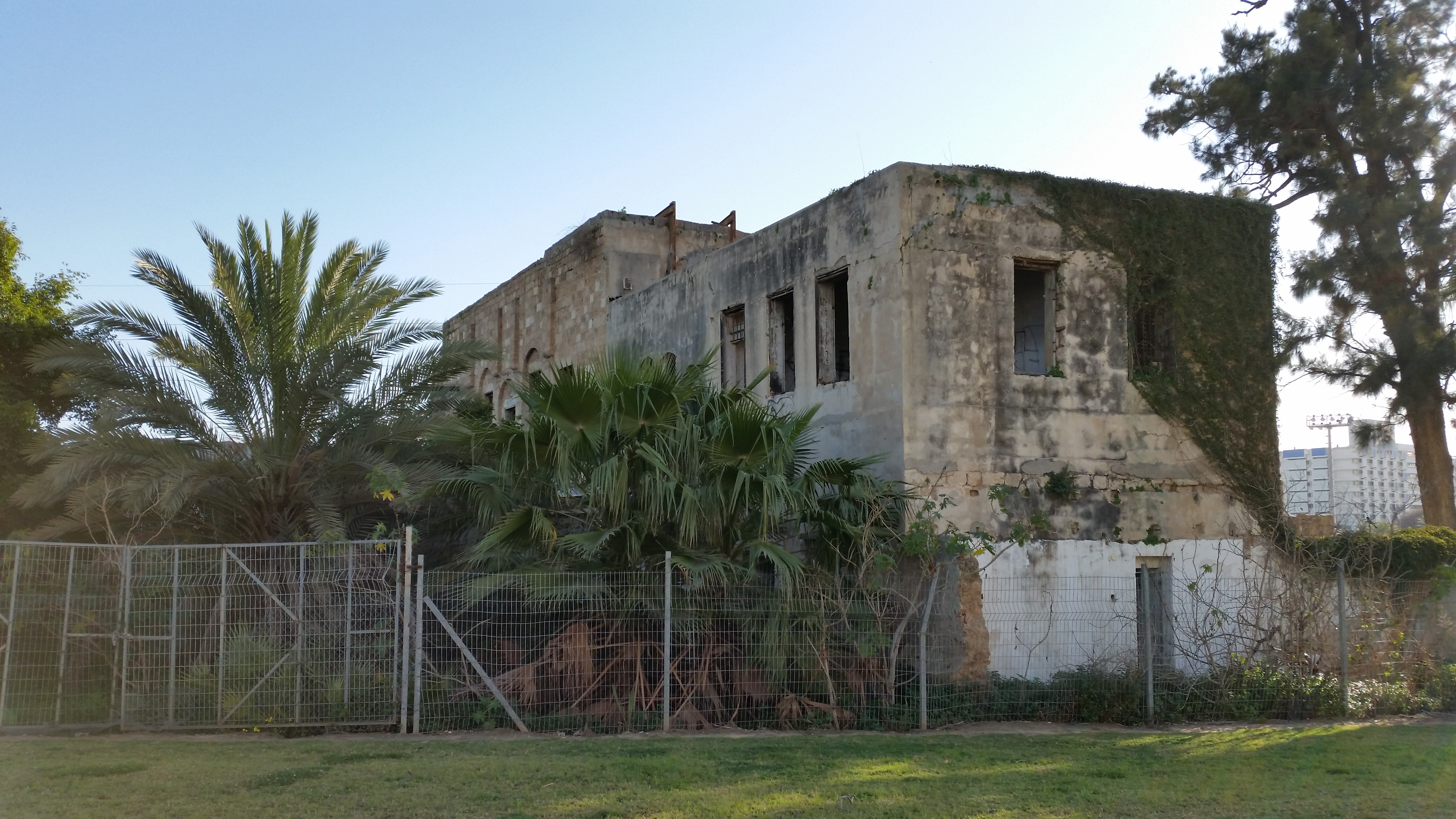 בית הביל"ויים מוקף גינה ציבורית בקצה שכונת נוה עופר